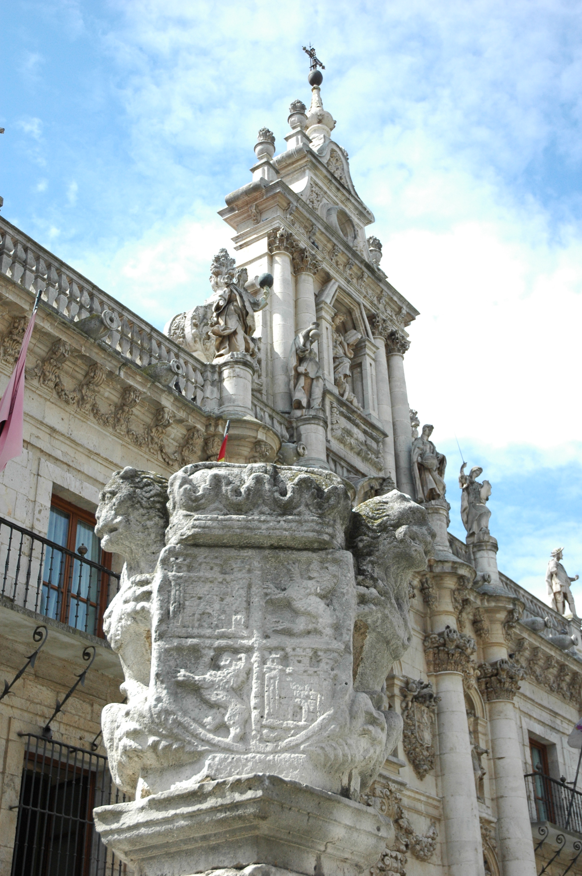 Con los leones de esquina. Se me ha quemado porque hace un sol de mil demonios y la Nikon D70s no la llevo muy bien.